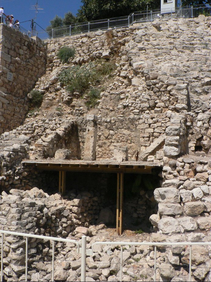 עיר דוד - בית אחיאל This is a photo of a heritage building in Israel. Its ID is 11-3000-103